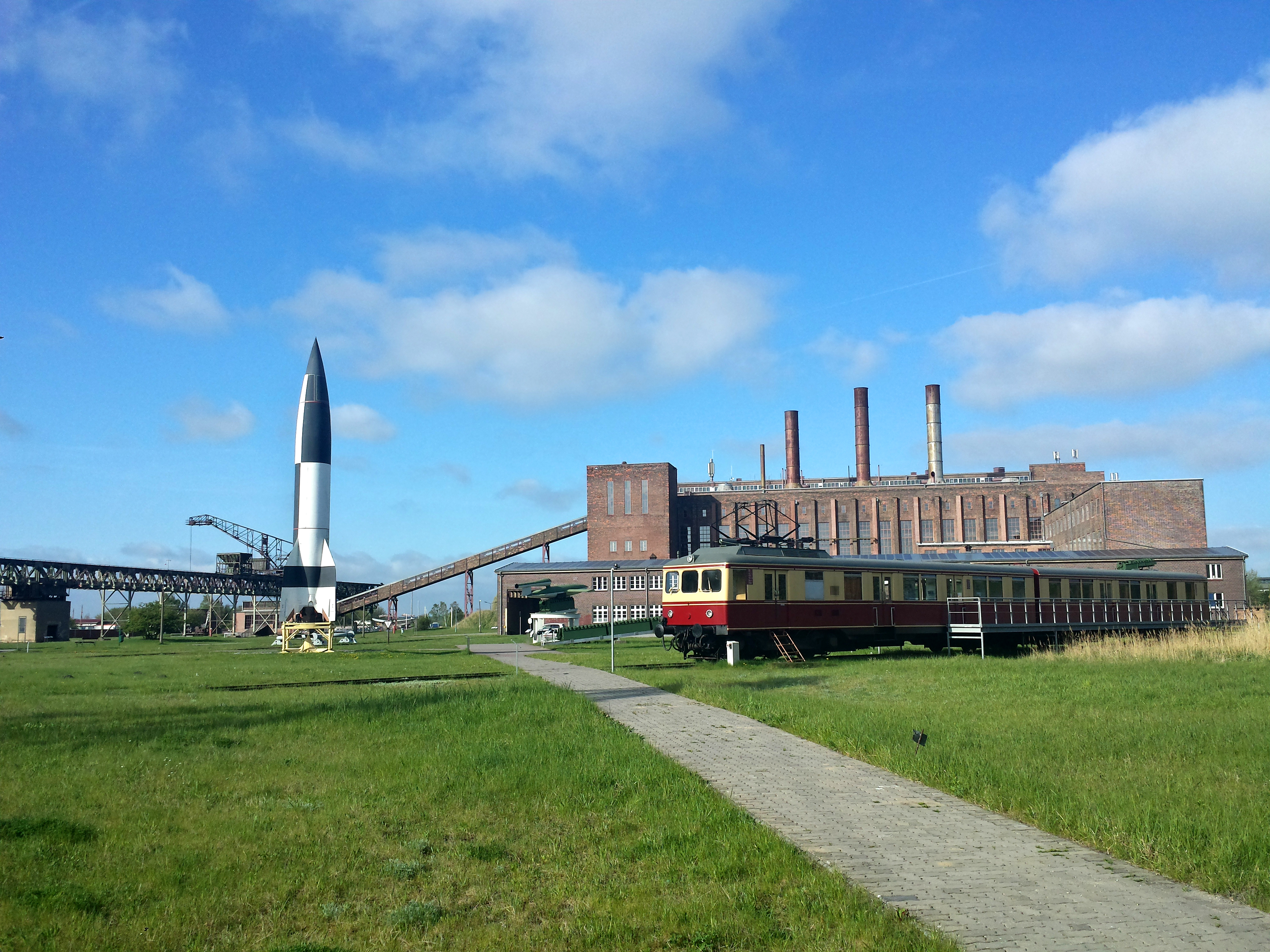 Freigelände des Historisch-Technischen Museums Peenemünde mit Großexponaten vor dem Kraftwerk